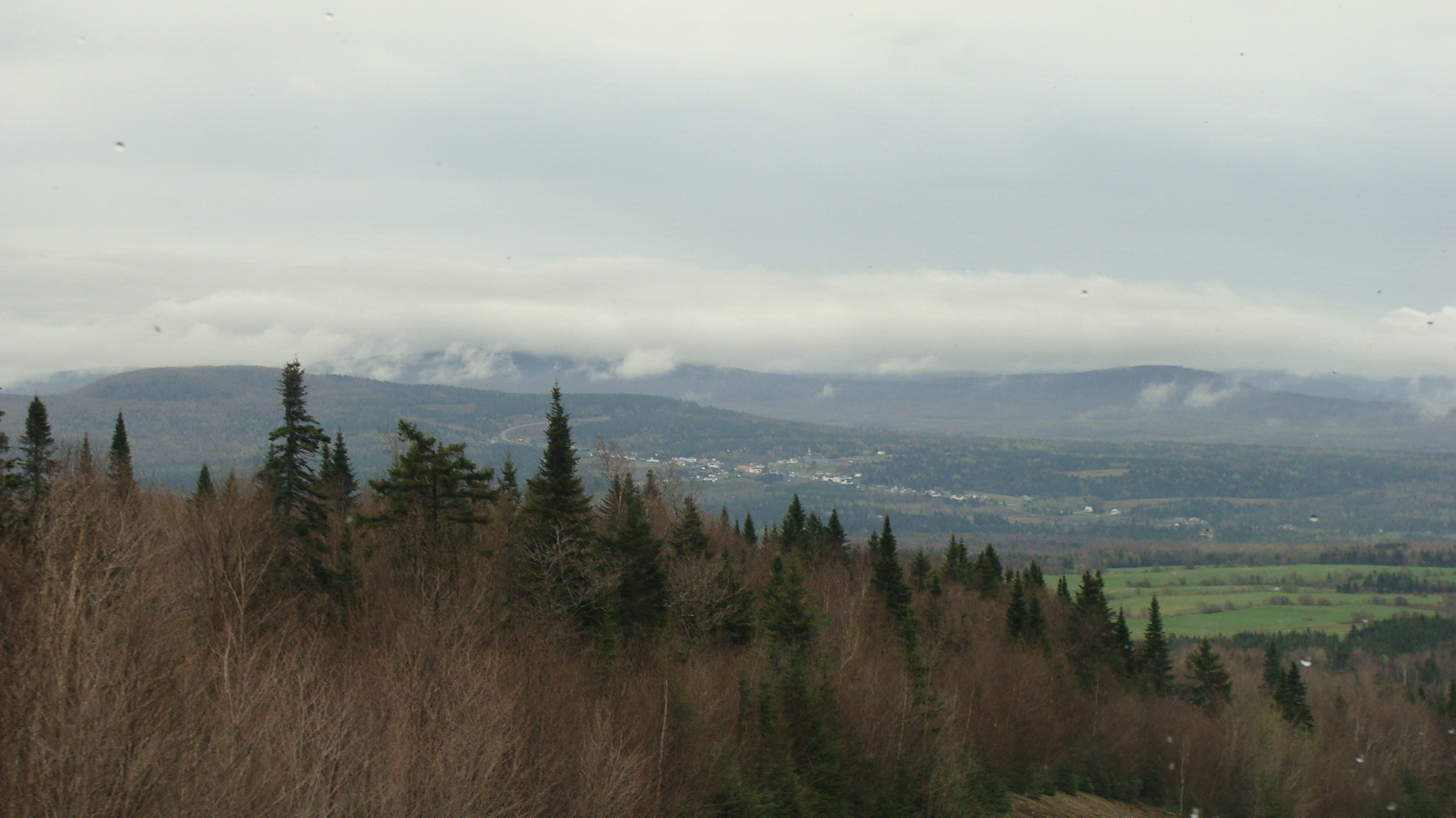 Notre-Dame-des-Bois, au Québec (Canada). Vue de la route menant au sommet du mont-Mégantic.